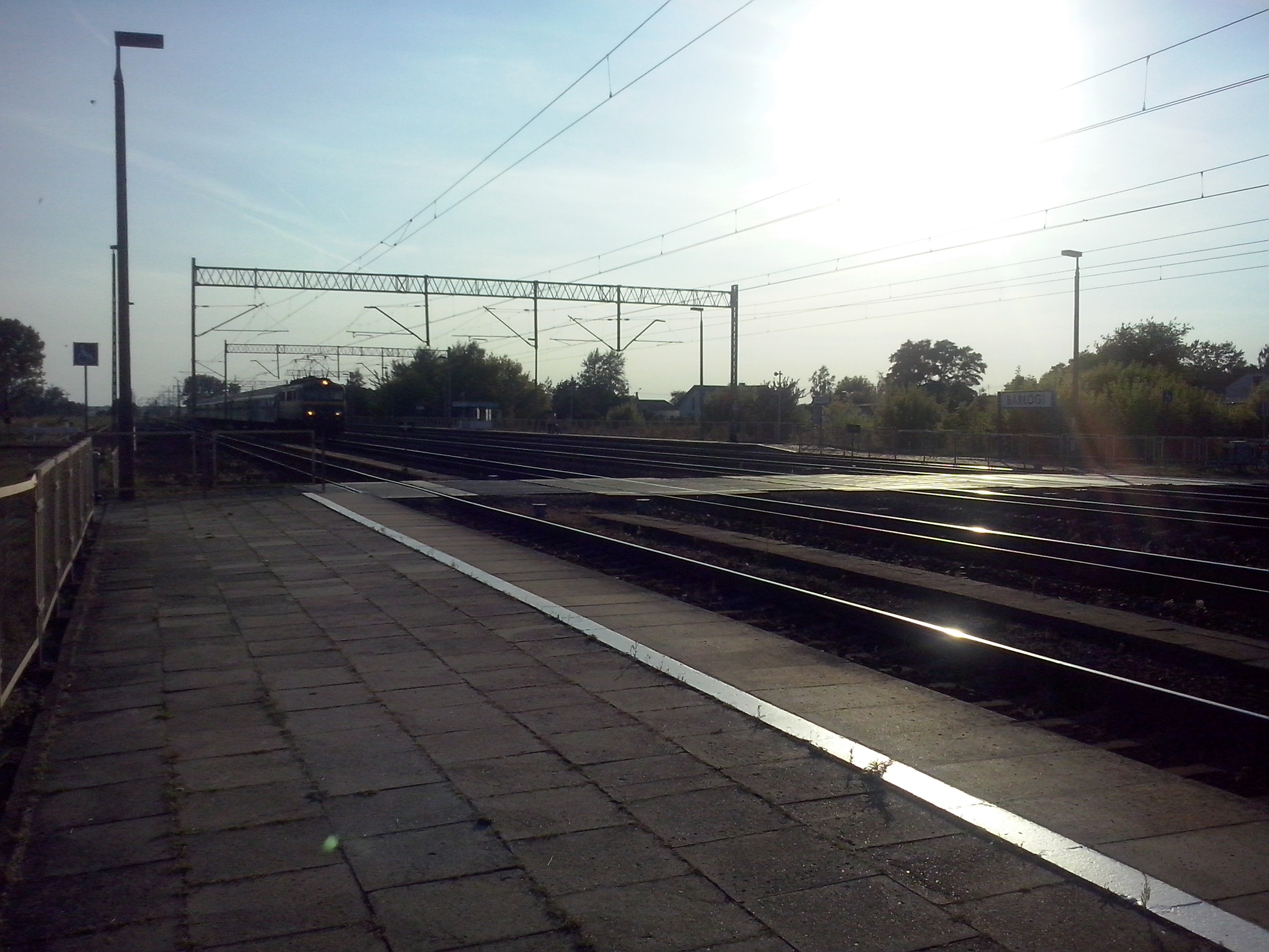 Pociąg iR Portowiec wjeżdżający na stację w Barłogach